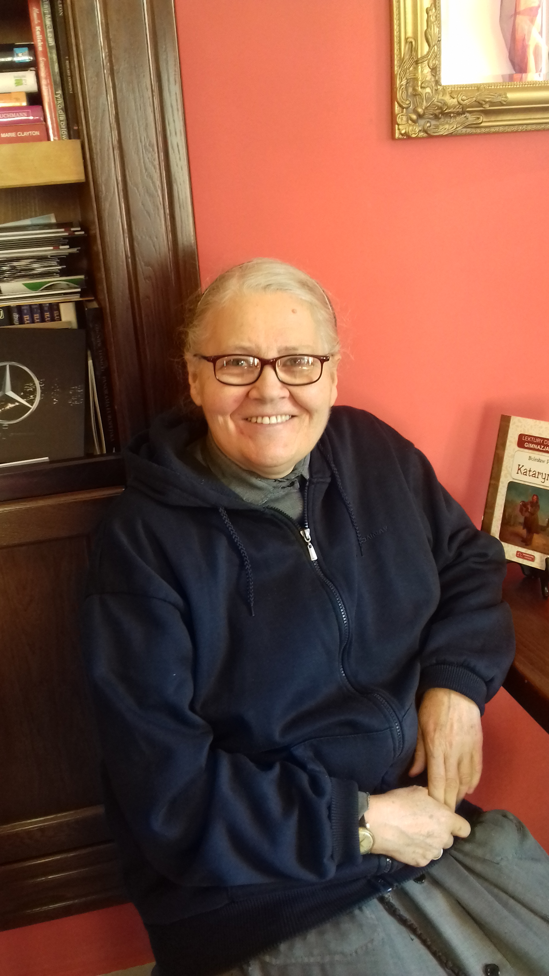 Zdjęcie wykonane w Lublinie, 2019 r.